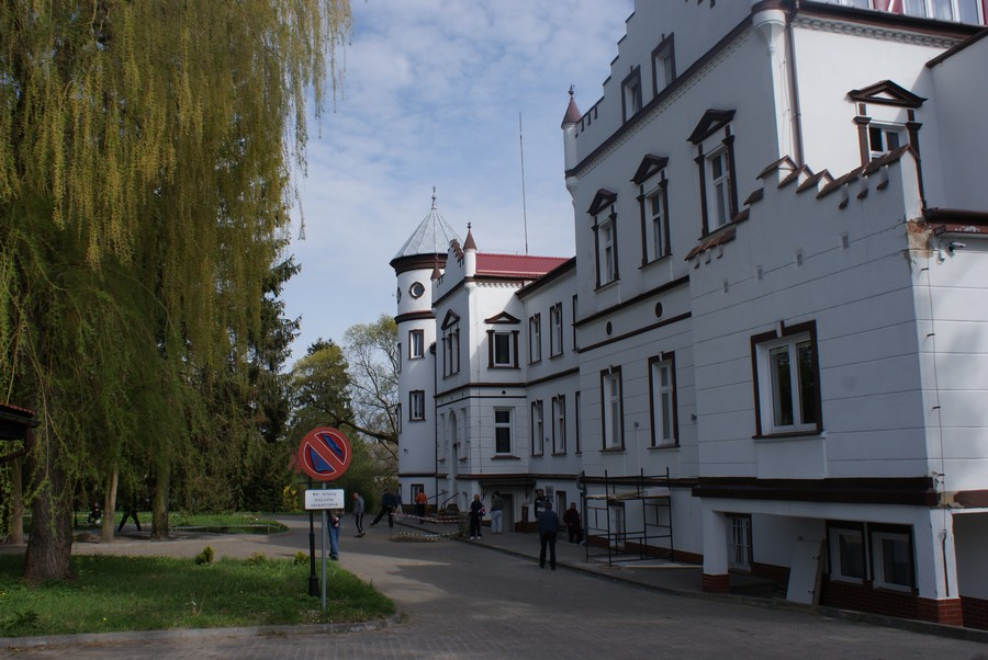 Pałac w Stanominie